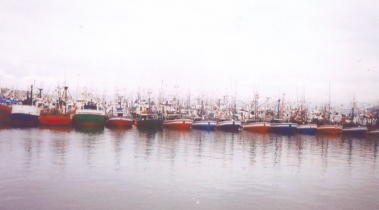 Barcos atracados en el puerto de Burela durante la "Guerra del bonito"